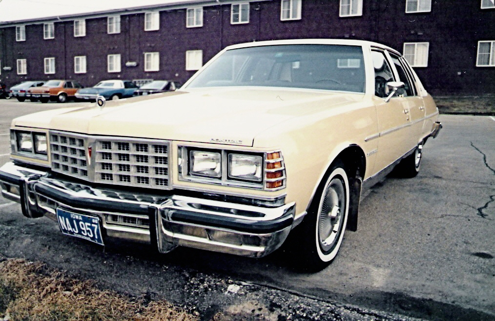 1977 Pontiac Bonneville Sedan in Mojave Beige-Tan